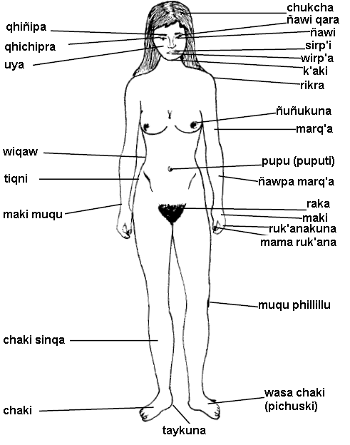 Runa Simi: Warmip kurkun